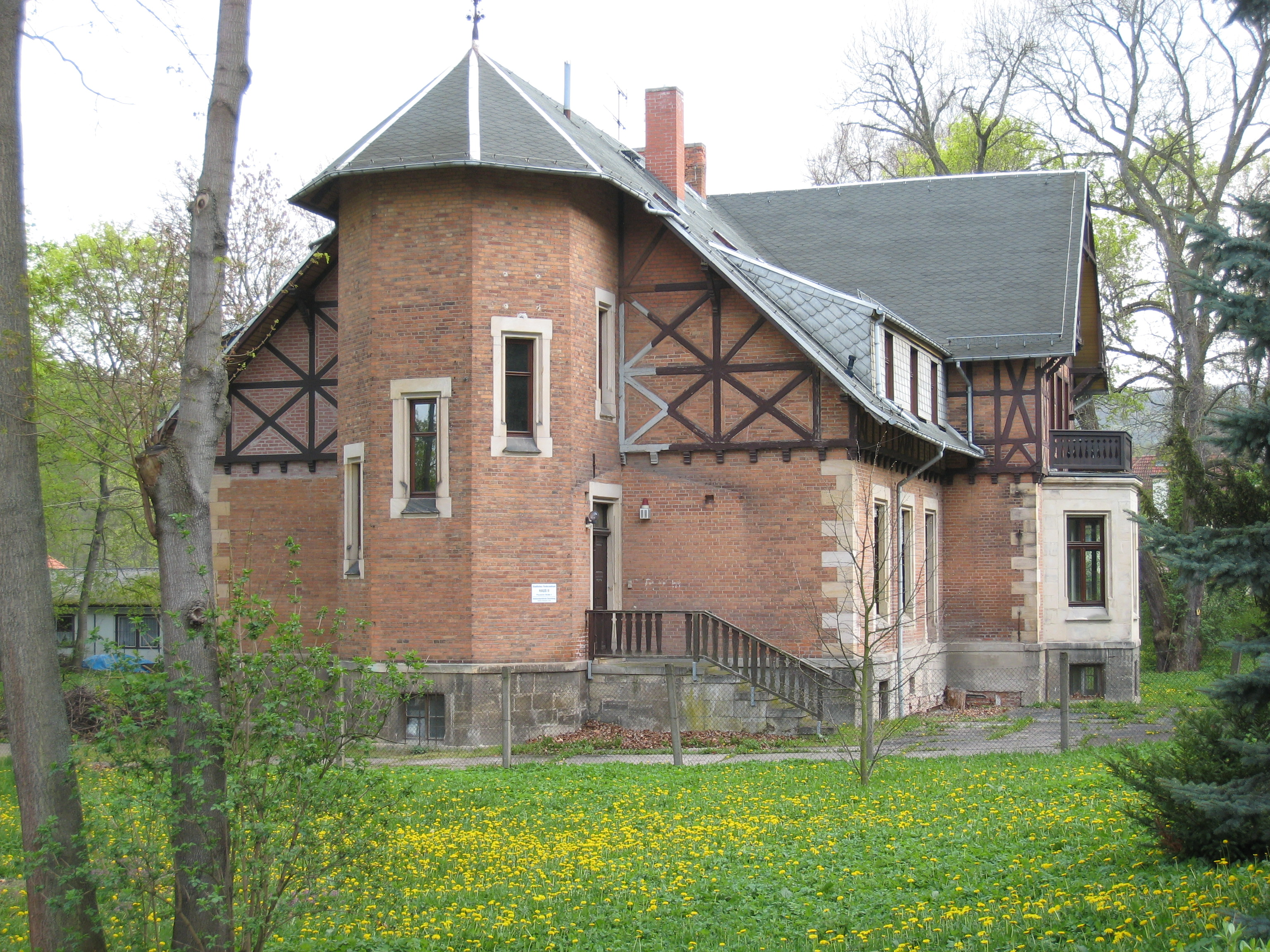 Villa im Villengarten Franz in Arnstadt, Plauesche Straße